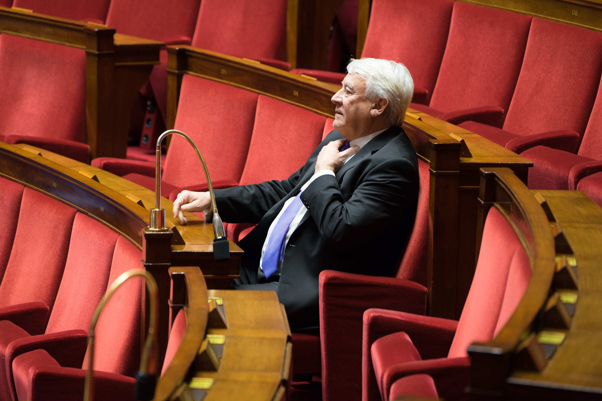 Claude Goaguen - Assemblée nationale